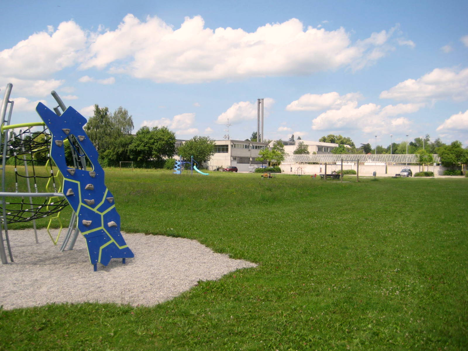 Das Gymnasium Olching liegt nahe dem neuen Schwaigfeldpark